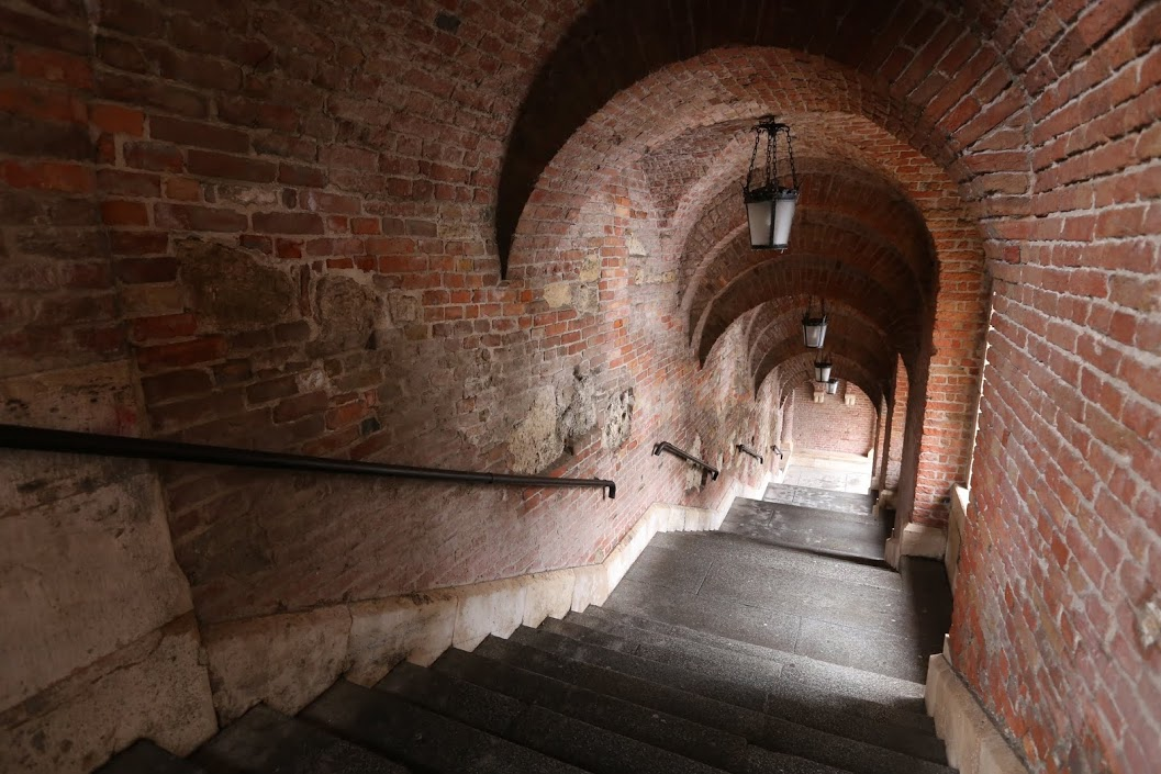 Jezsuita lépcső, a Halászbástya alatt